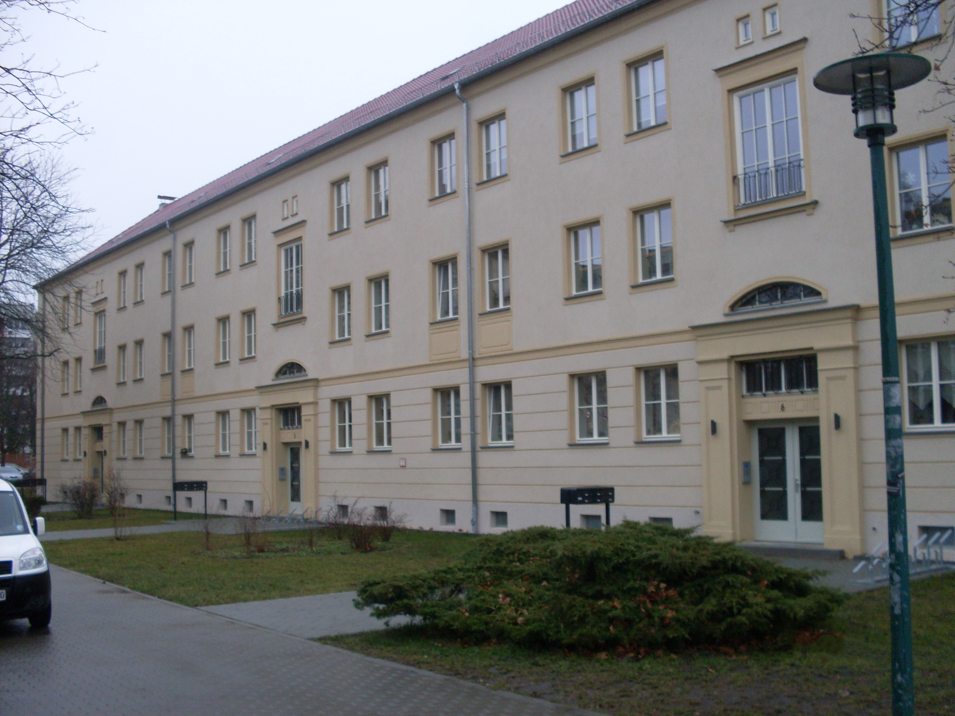 Wehrpromenade in Cottbus, Teil der denkmalgeschützten Großwohnsiedlung Sandow